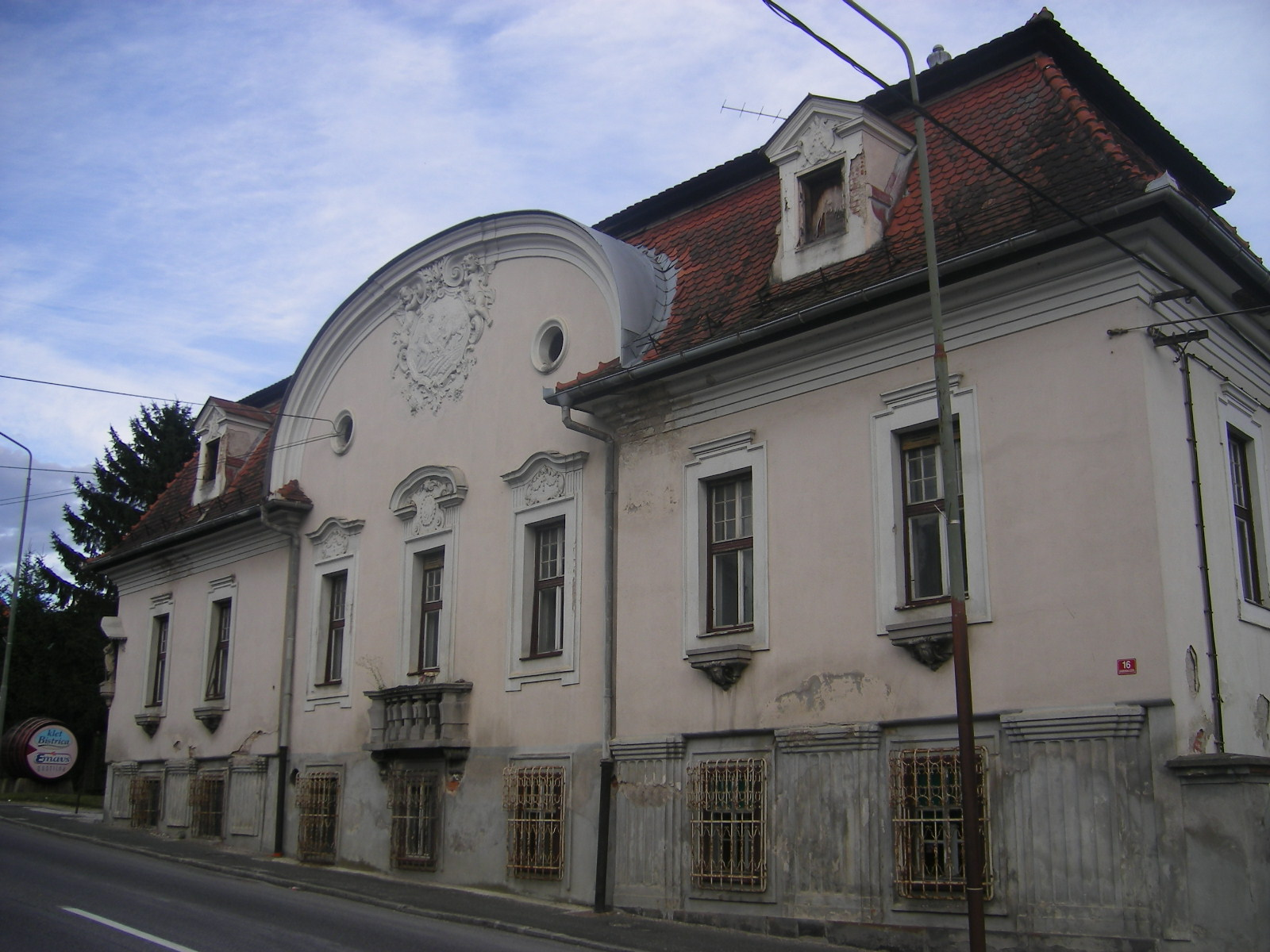 Slovenska Bistrica